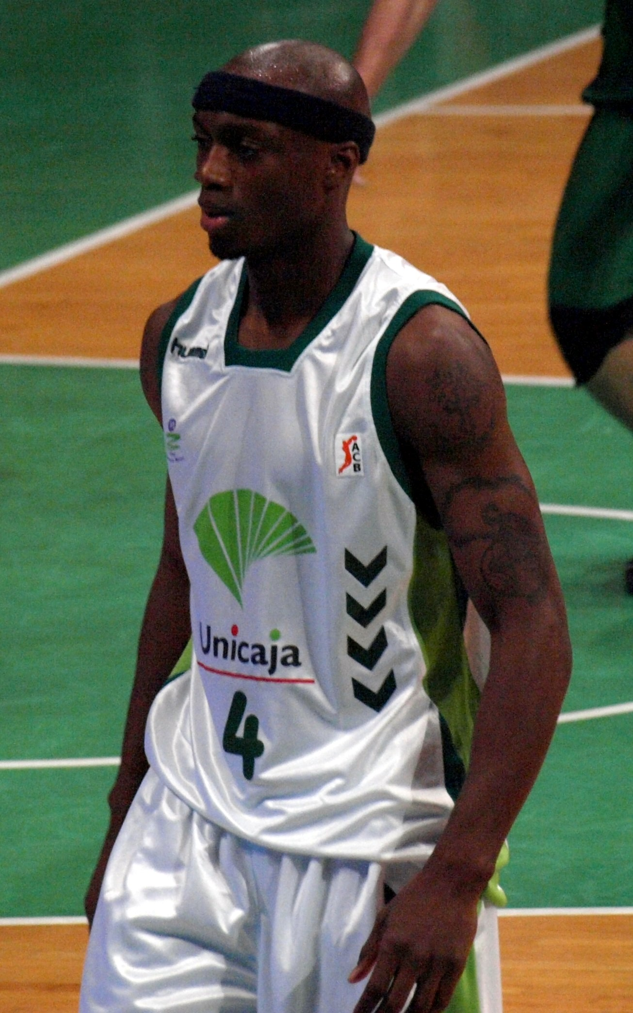 Joseph Gomis en el partido que enfrentó al al Unicaja Málaga y al DKV Joventut de liga ACB en el Olímpico de Badalona en febrero de 2009.